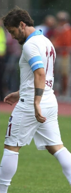 Barış Memiş